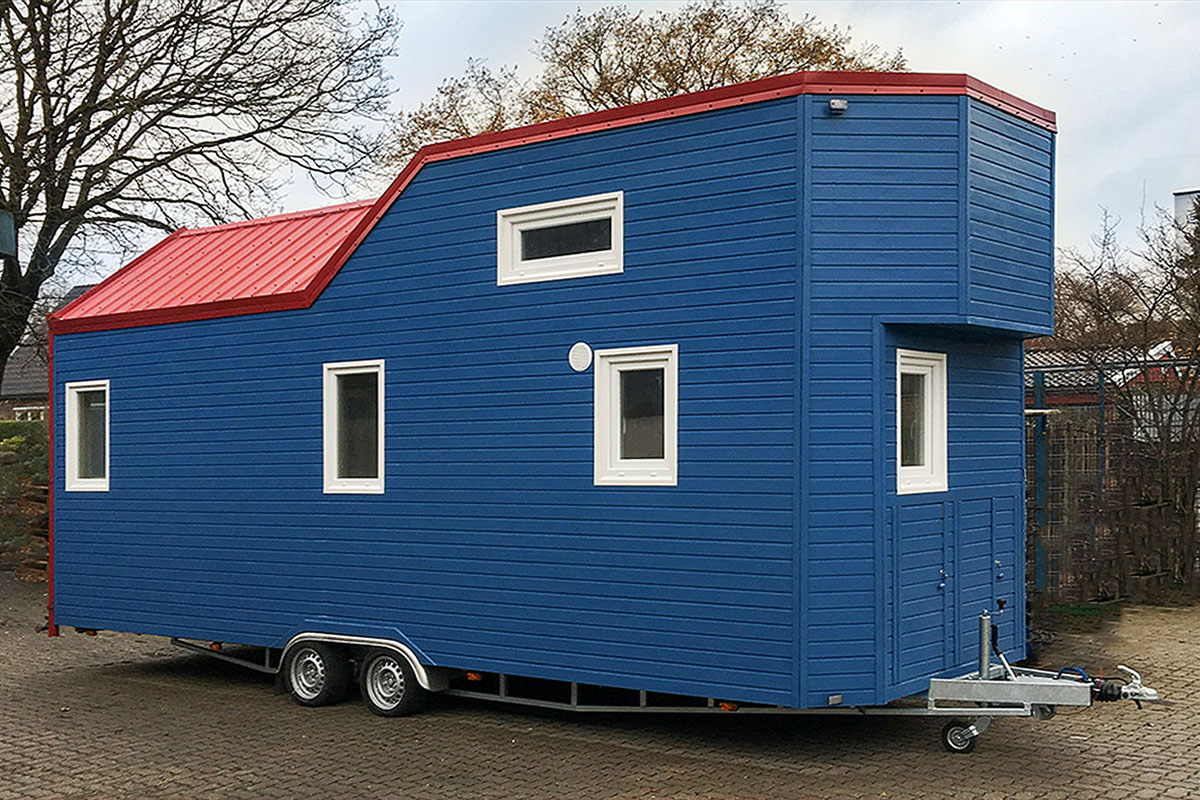 Tiny House auf PKW-Anhänger nach deutschem Recht